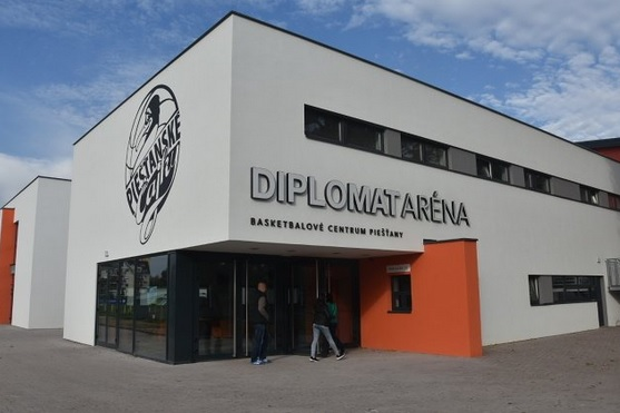 Centro de Baloncesto de Piešťany